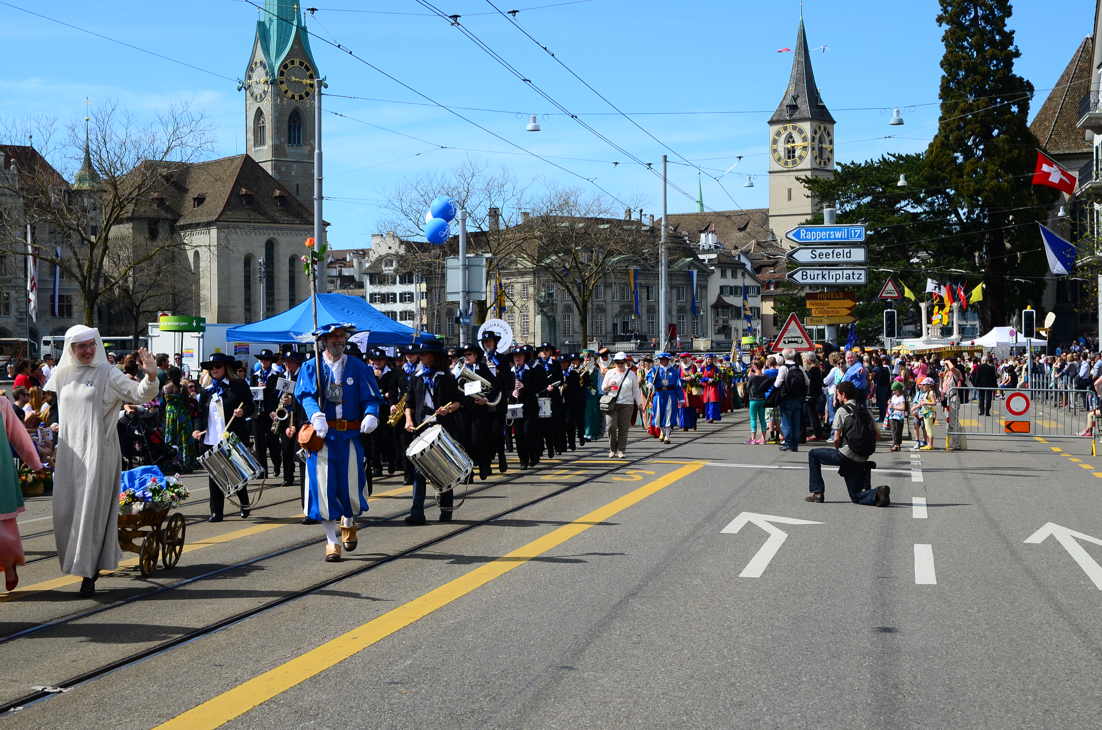 Ladies of the honorable Gesellschaft zu Fraumünster (Fraumünster society respectively guild), being (unwanted) 'guests' at the parade of the Zünfte (guilds), on Sechseläuten-Montag, April 15, 2013, in Zürich (Switzerland)